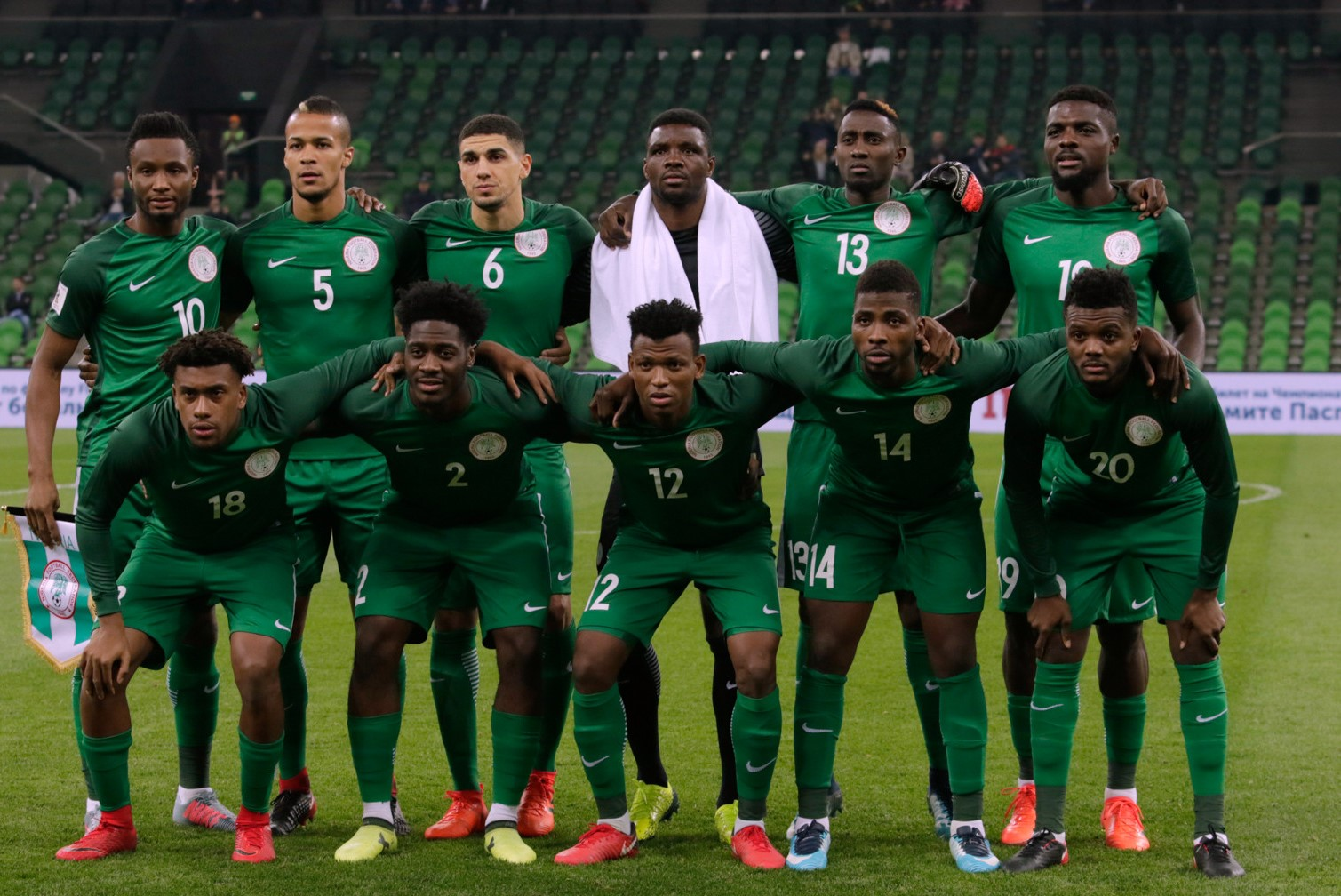 Nigeria national football team